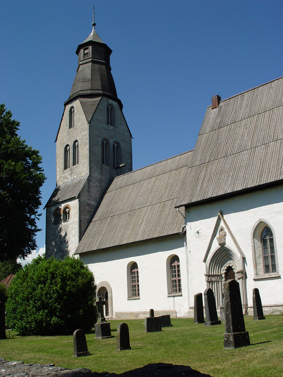 Lye kyrka auf Gotland(12.-14-Jh).